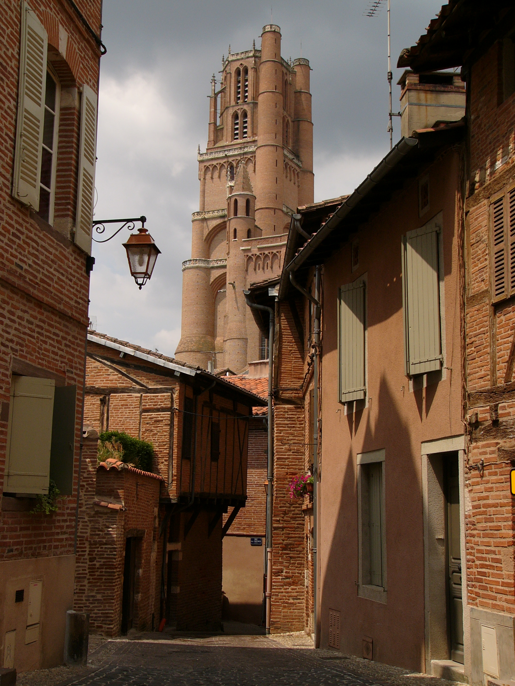 Straat in Albi